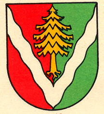 Wappen der Gemeinde Villars-Mendraz Kanton Waadt Schweiz